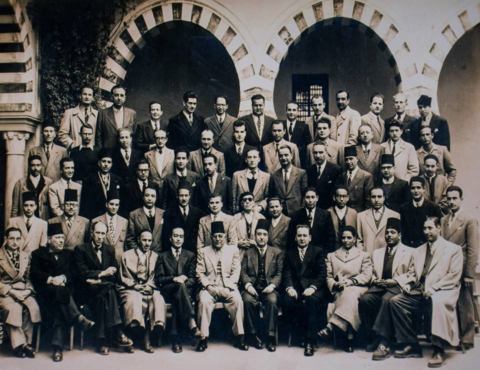 Le corps enseignant du collège Sadiki. Mahmoud Bouali debout au dernier rang à droite. Photo prise probablement en 1945.